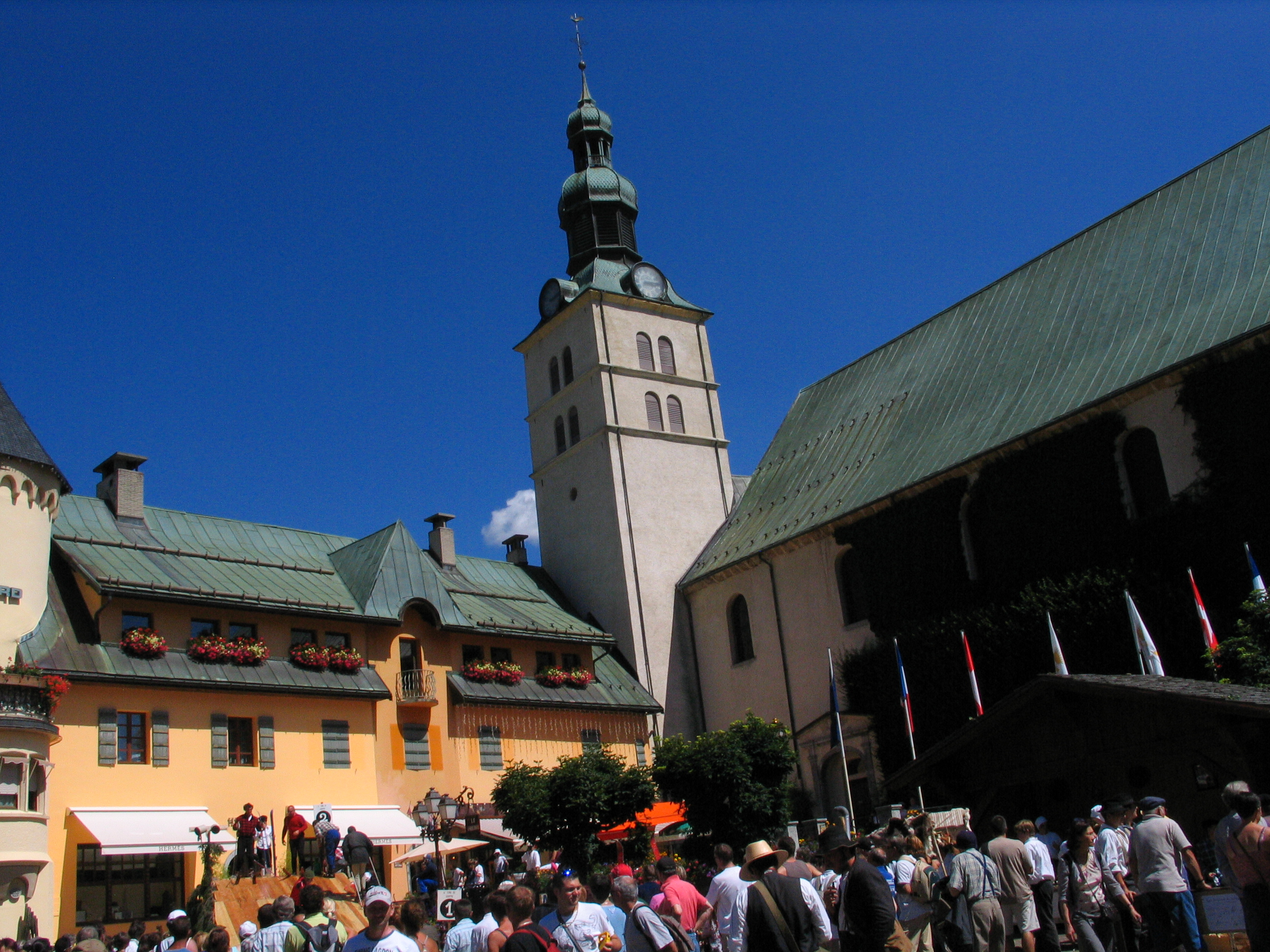 Megève, place de l'Église, fête traditionnelle